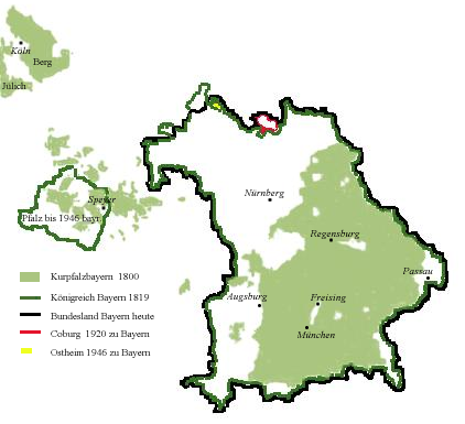 Entwicklung Bayerns von 1800 bis heute selbst erstellte Karte